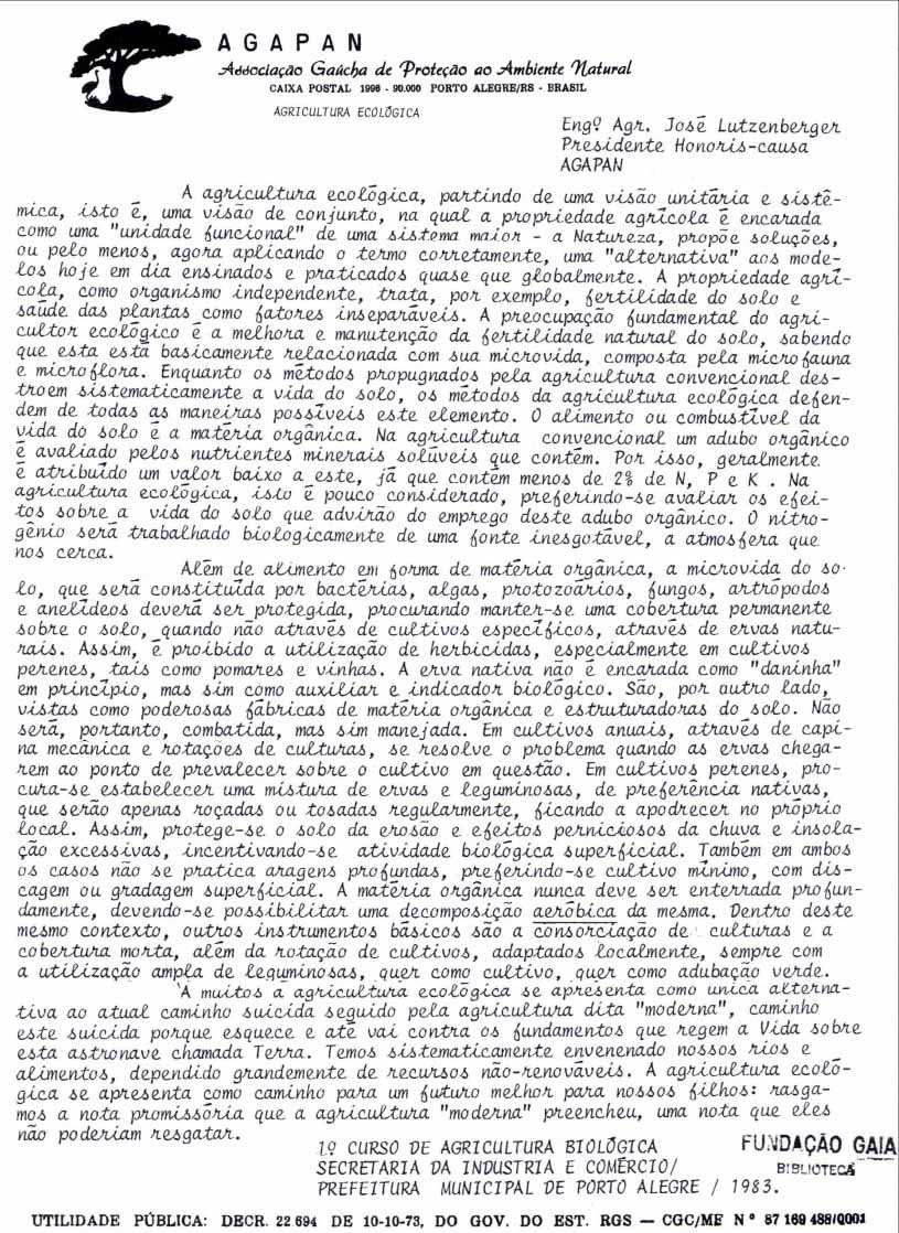 Memorando do primeiro curso de agricultura ecológica do Brasil